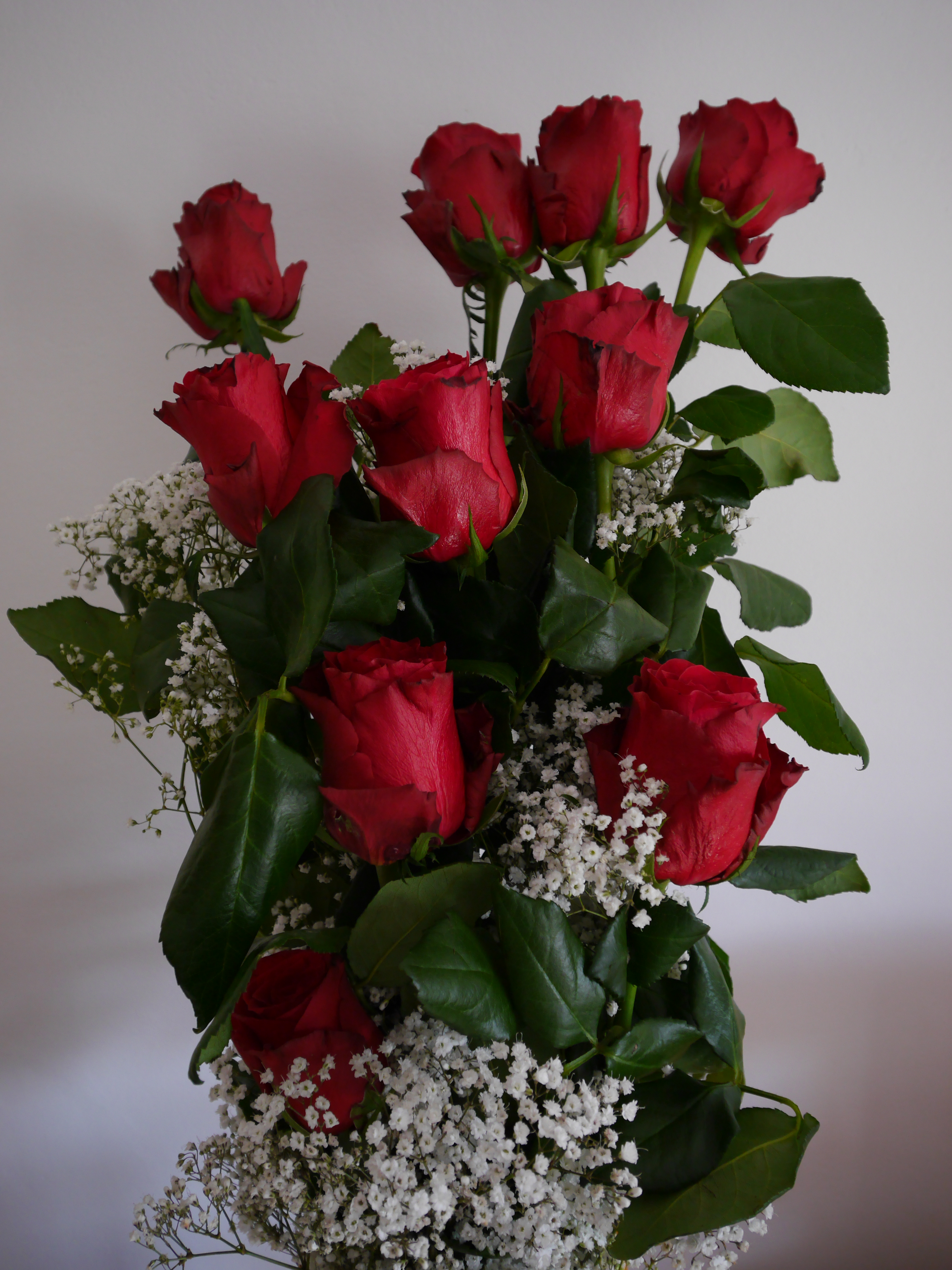 This photo was taken with Panasonic Lumix DMC-G6 camera, thanks to Panasonic.You can see all photographs in category: Taken with Panasonic Lumix DMC-G6.